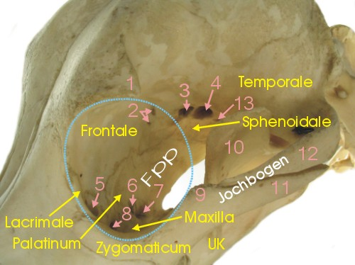 Linke Orbitalregion vom Hund von vorn-oben-seitlich (Orbita blau umrandet)1 Processus zygomaticus des Stirnbeins, 2 Foramina ethmoidalia, 3 Canalis opticus, 4 Fissura orbitalis, 5 Fossa sacci lacrimalis, 6 Foramen sphenopalatinum, 7 Foramen palatinum caudale, 8 Foramen maxillare, 9 Processus frontalis des Jochbeins, 10 Processus coronoideus des Unterkiefers, 11 Processus temporalis des Jochbeins, 12 Processus zygomaticus des Schläfenbeins, 13 Foramen alare rostrale, UK Unterkiefer, Fpp Fossa pterygopalatina